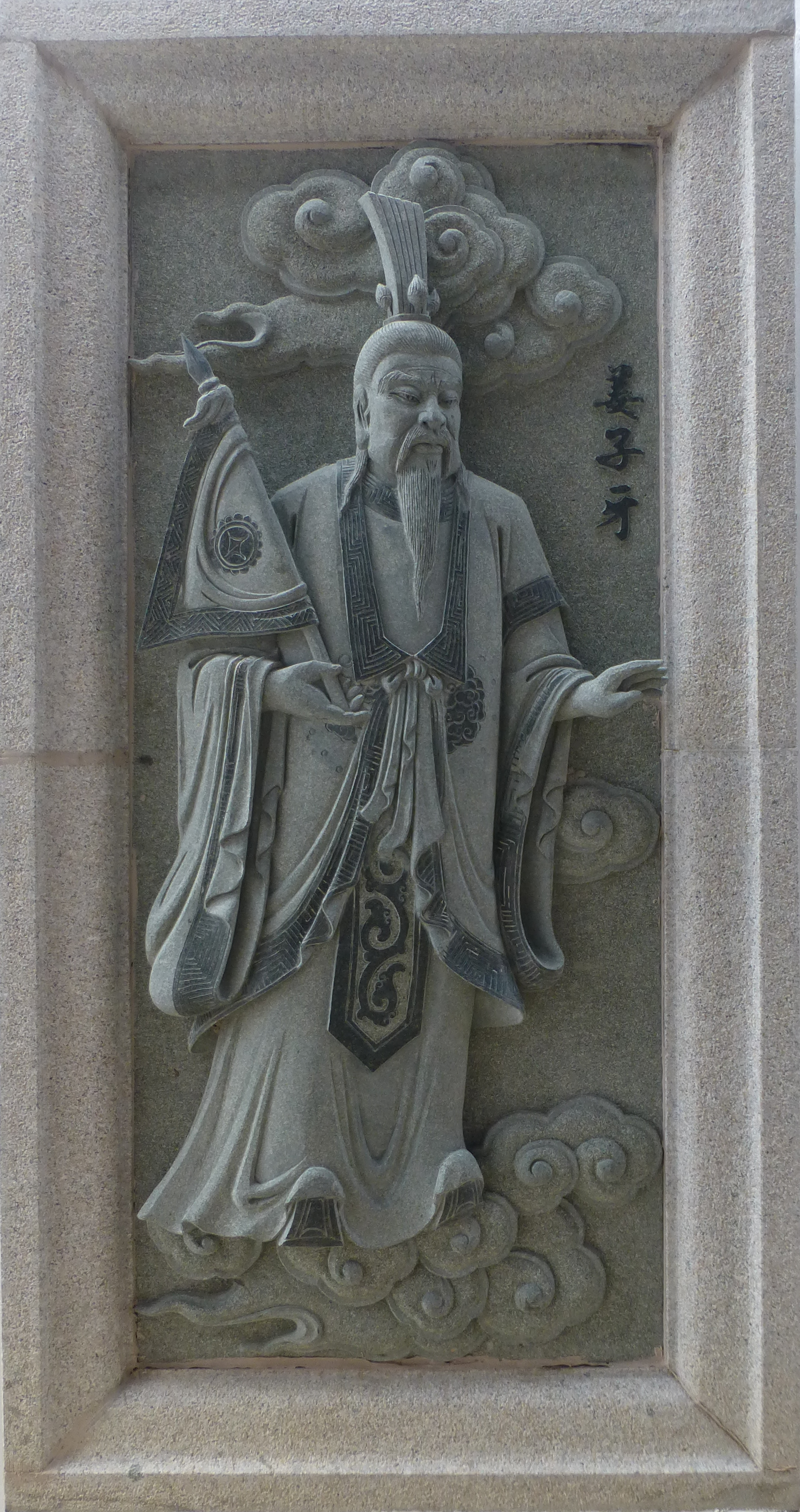 045 Jiang zi ya (lushang), Investiture of the Gods at Ping Sien Si, Pasir Panjang, Perak, Malaysia Photograph from the Ping Sien Si Temple in Perak, Malaysia taken by Anandajoti.